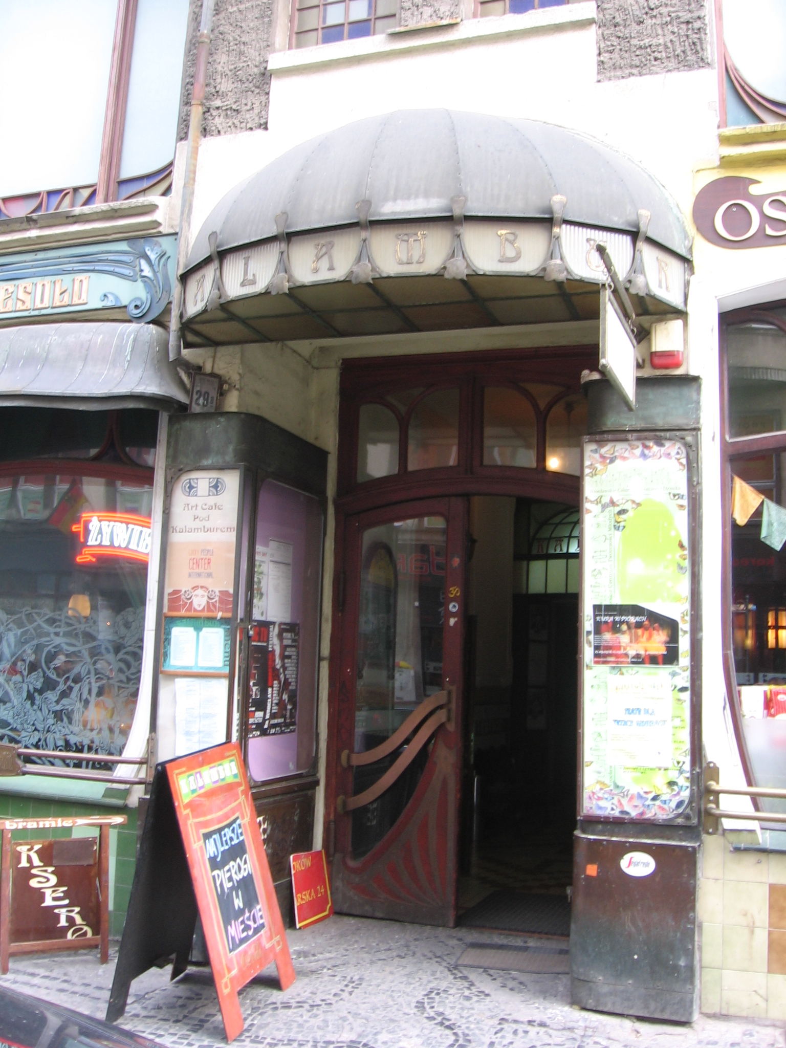 Ośrodek Teatru Otwartego "Kalambur" we Wrocławiu, ul. Kuźnicza 29 (wejście)